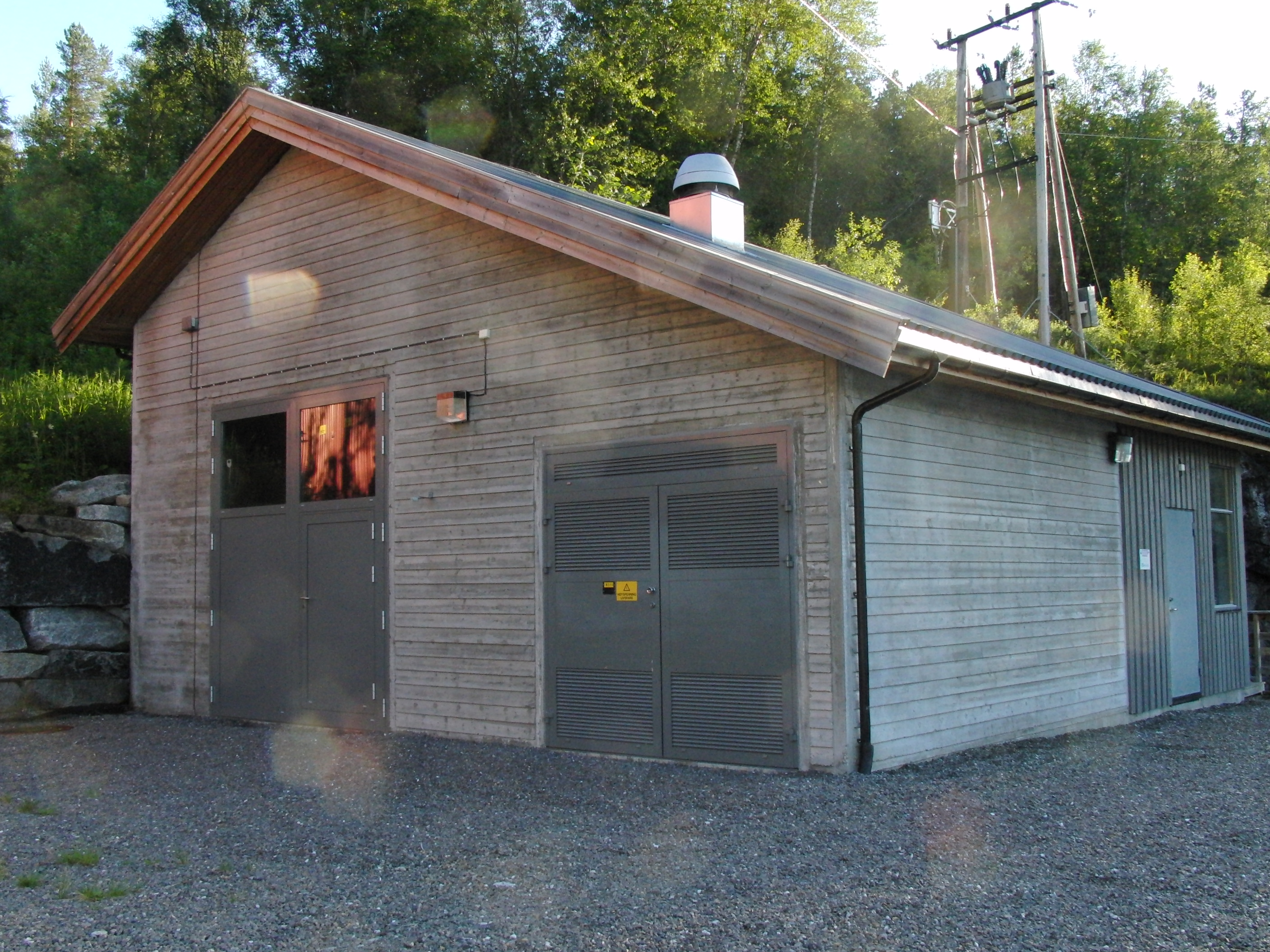 Røyrvatn nye kraftverk